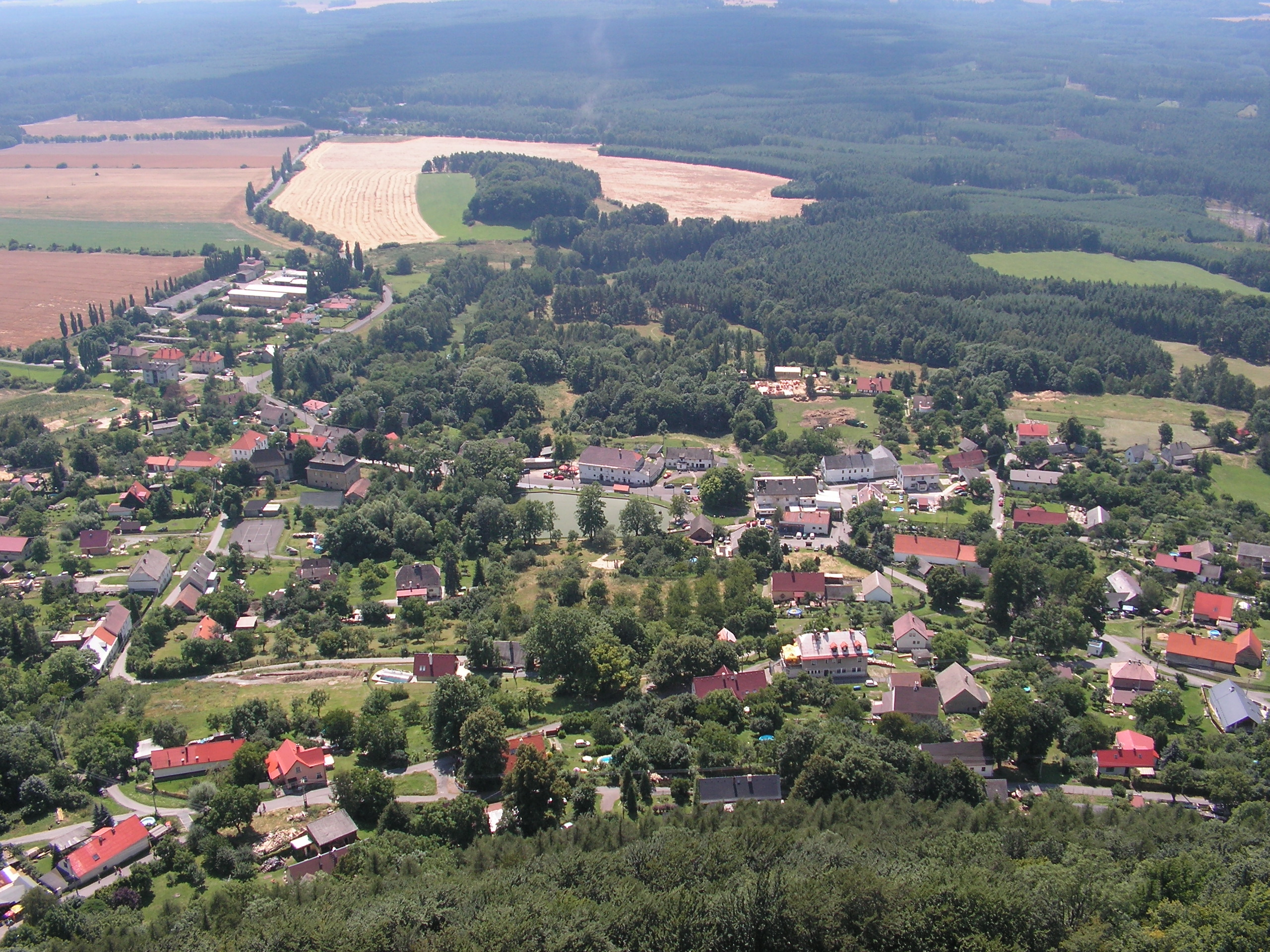 Obec Bezděz, okres Česká Lípa. Pohled ze stejnojmenného hradu.